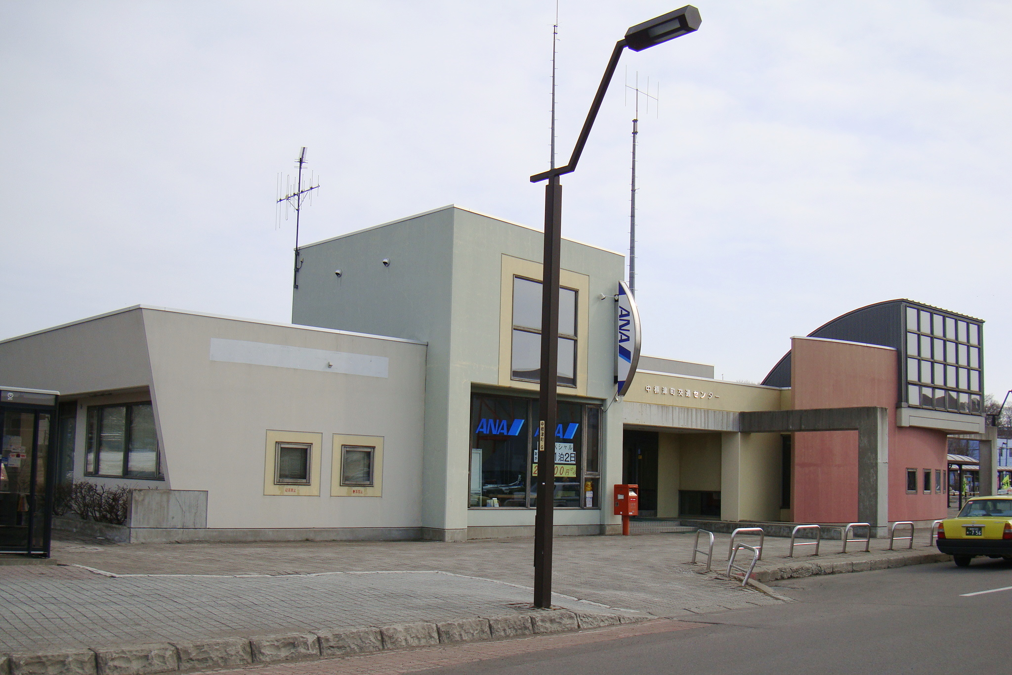 Naka-Shibetsu depot